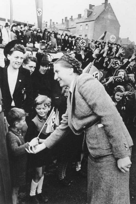 Associated Press Bild, Berlin Die Reichsfrauenführerin in Luxemburg Am 21. Oktober 1941 sprach die Reichsfrauenführerin, Frau Gertrud Scholtz-Klink, und der Chef der Zivilverwaltung, Gauleiter Gustav Simon, auf einer Großkundgebung des Deutschen Frauenwerks in der Ausstellungshalle der Stadt Luxemburg. Das Interesse der Luxemburger Frauen war so groß, dass die riesige Halle vorzeitig wegen Überfüllung geschlossen werden musste, und viele Frauen aus diesem Grunde die Reden außerhalb der Kundgebung mitanhörten. Unser Bild zeigt die Ankunft der Reichsfrauenführerin in Luxemburg, von der Bevölkerung herzlich begrüßt.